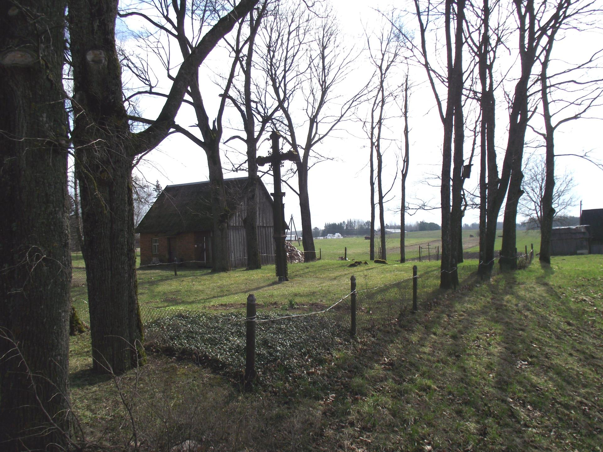 Migonių kaimo senosios kapinės